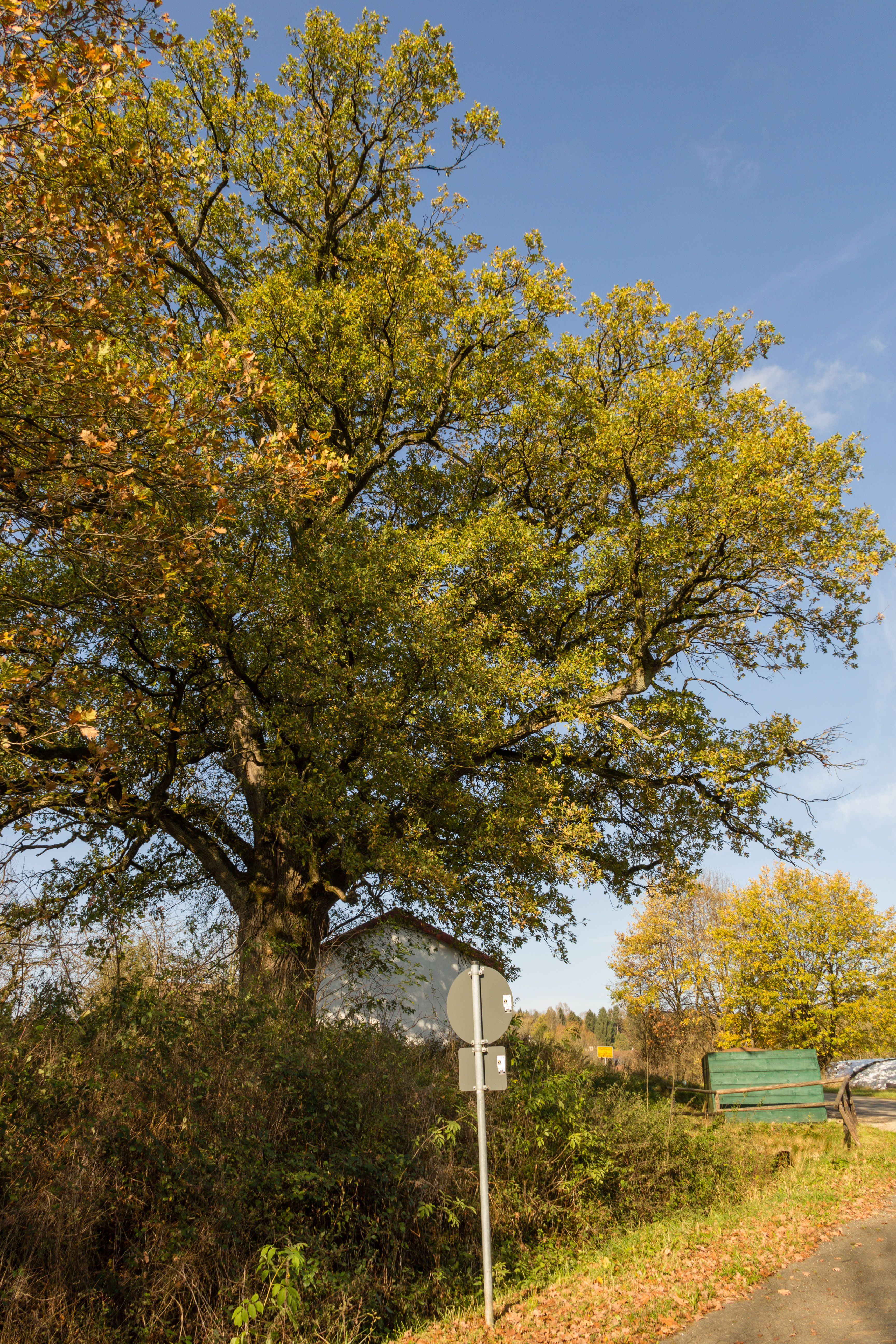 Altdorf, Pühlheim, Dorfeiche, Naturdenmal